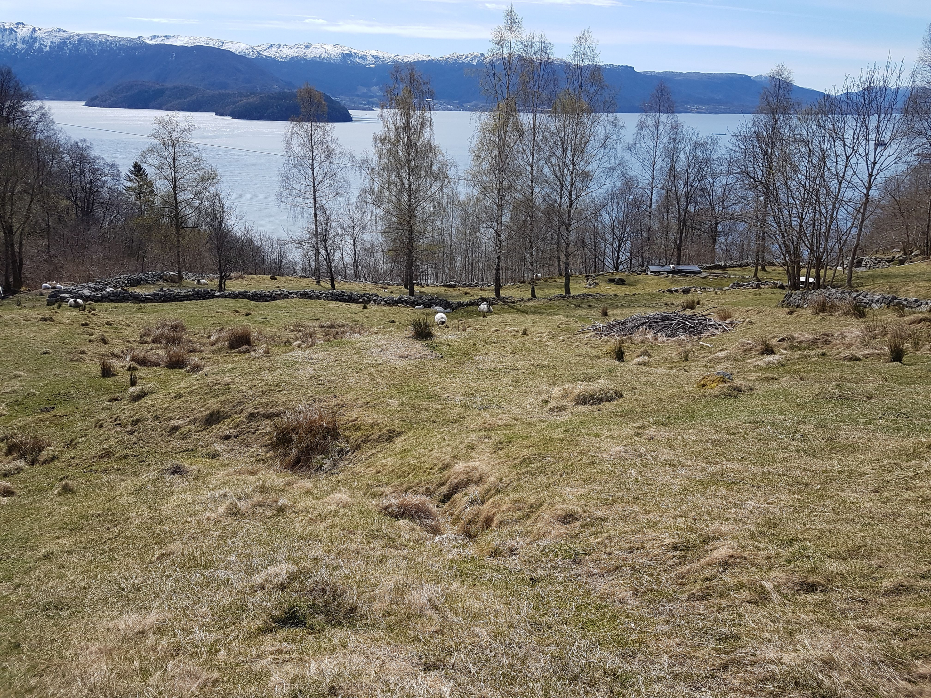 Holmedal gamle kirkested. Foto: Roger Grimelid. Fra Riksantikvarens Kulturminnesøk.